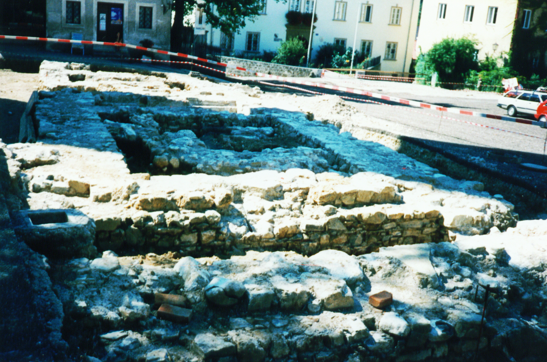 Ausgrabungen_sb